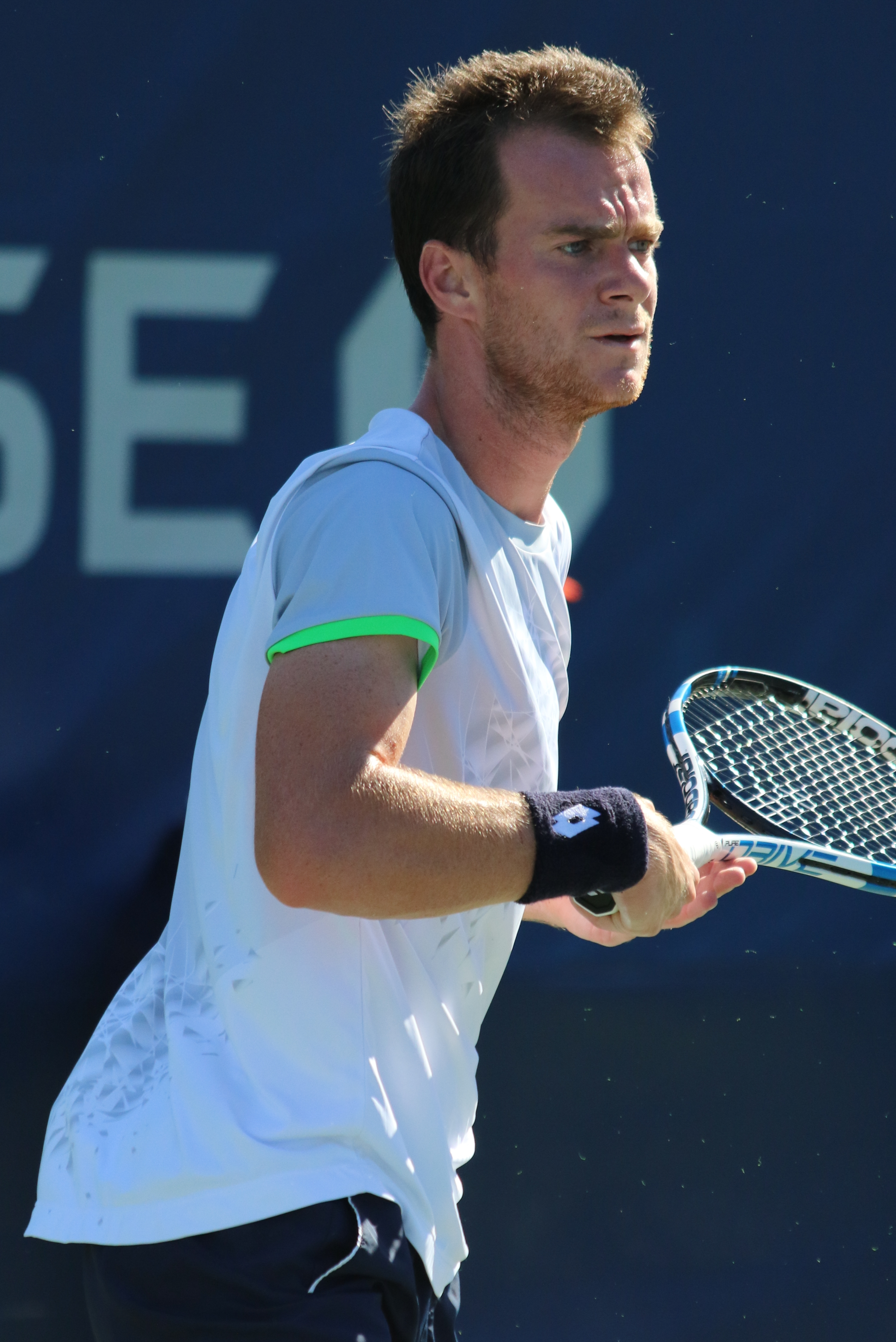 Satral US16 (7)